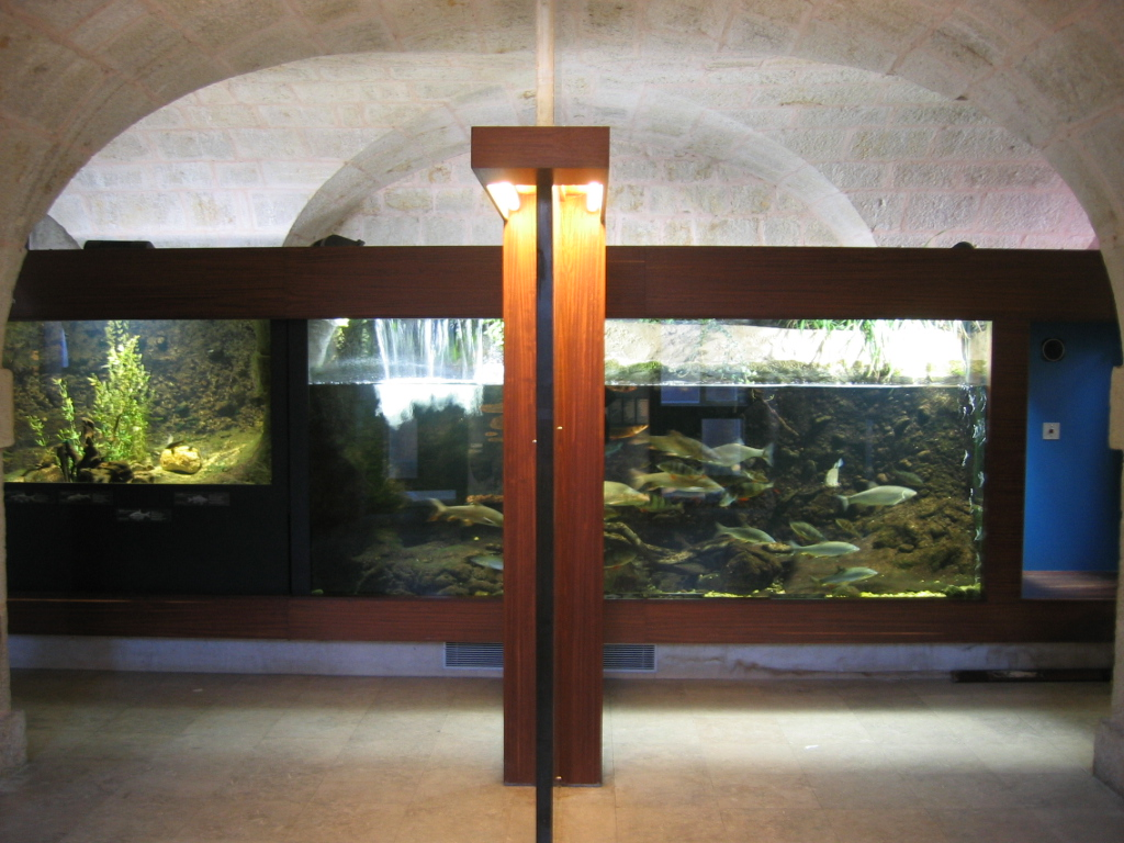 Citadelle de Besançon